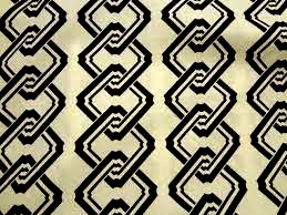 CG